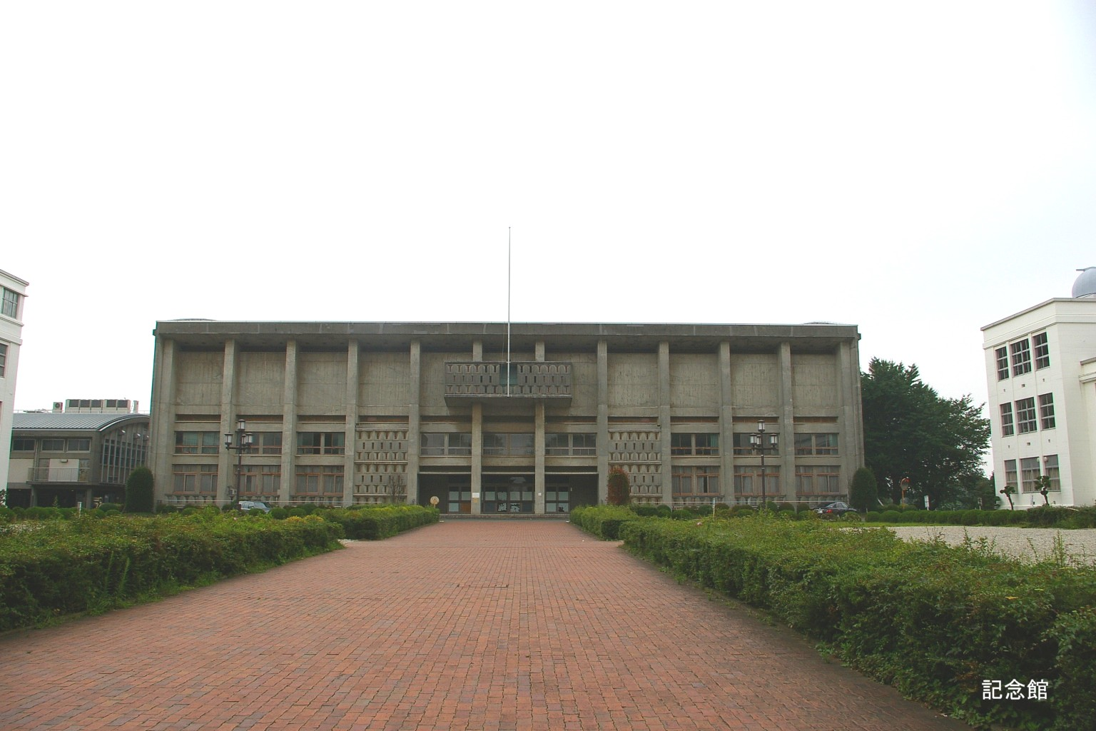 2009.5日本国内で塾生 (talk)が撮影。